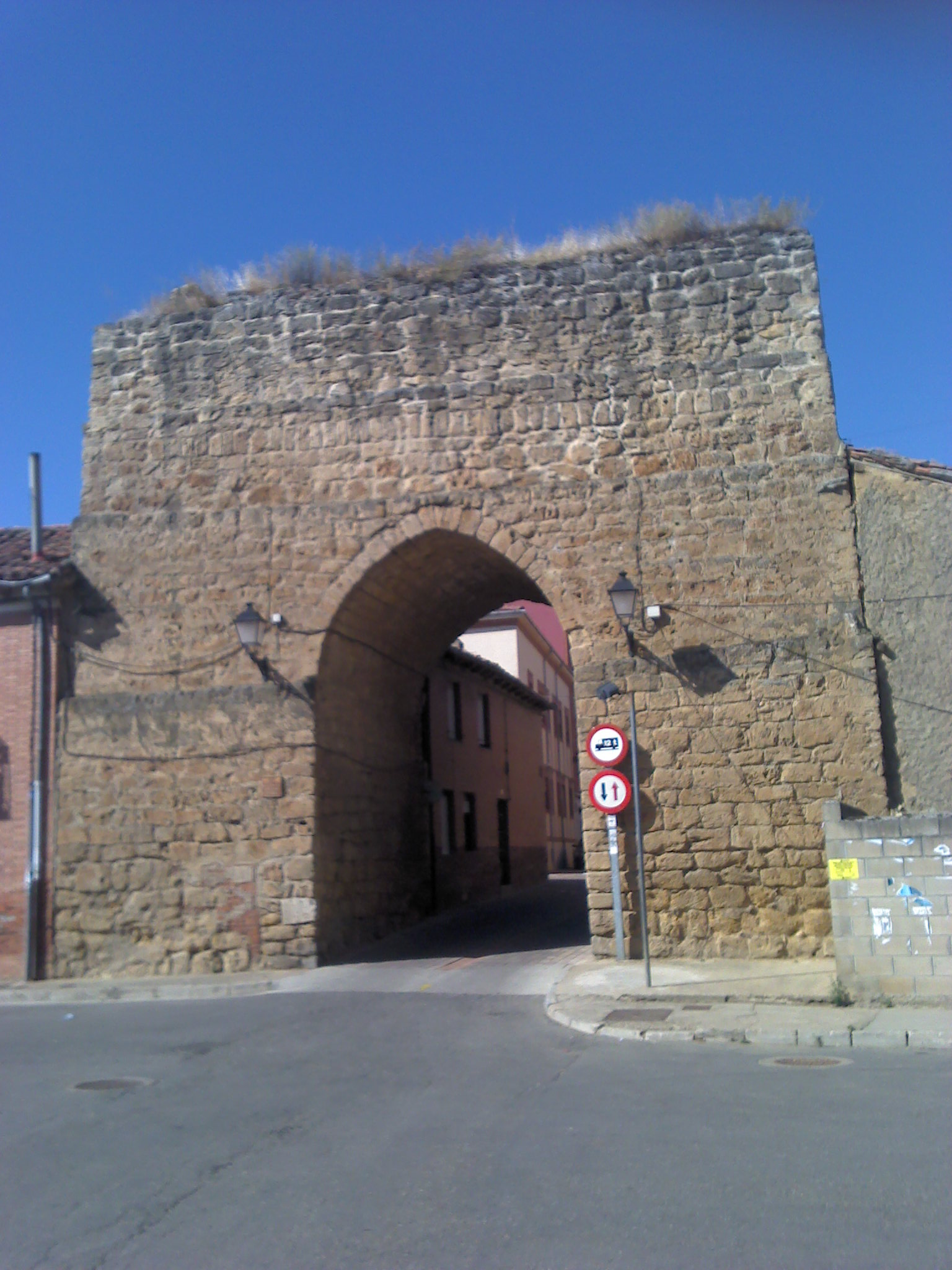 Entrada por la Puerta de la Concepción al Recinto Amurallado de Mansilla de las Mulas